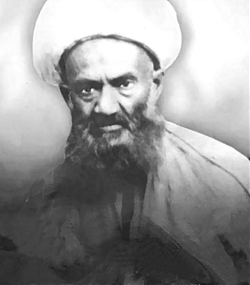 حسنعلی نخودکی اصفهانی